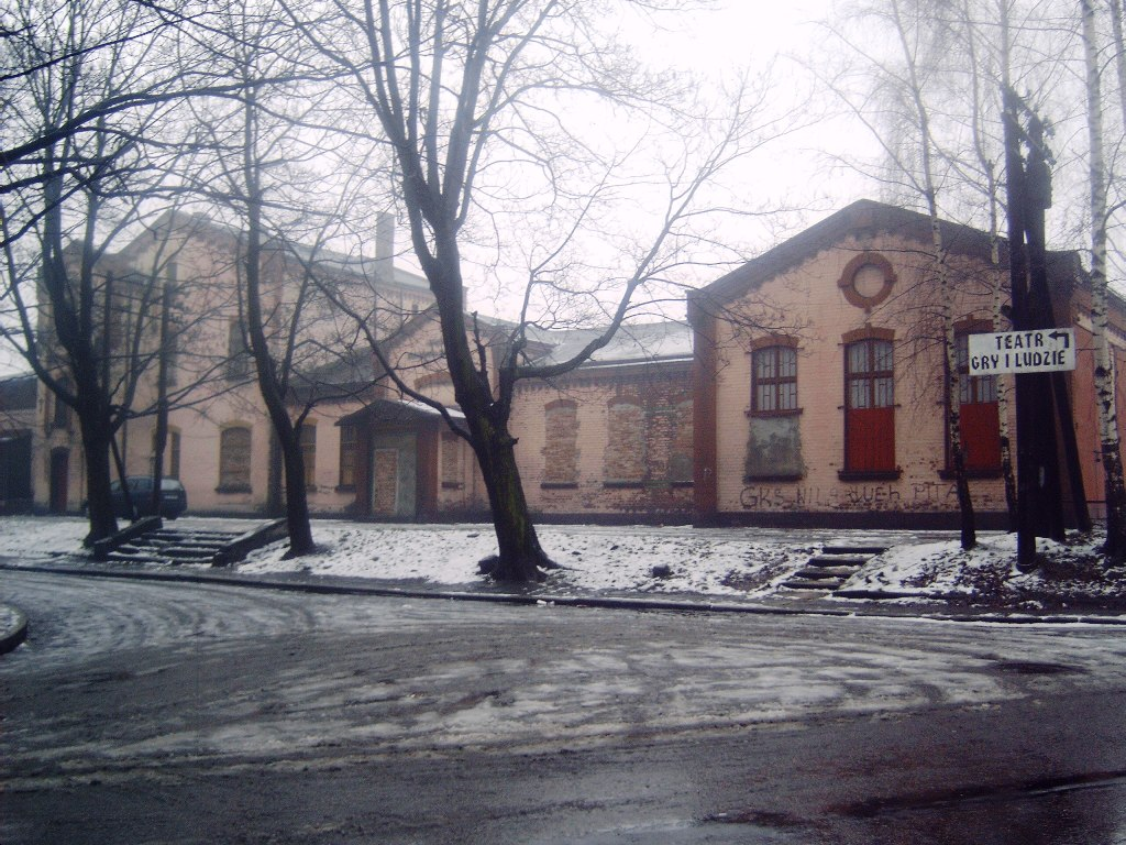 Teatr "Gry i Ludzie" w Katowicach - Dąbrówce Małej